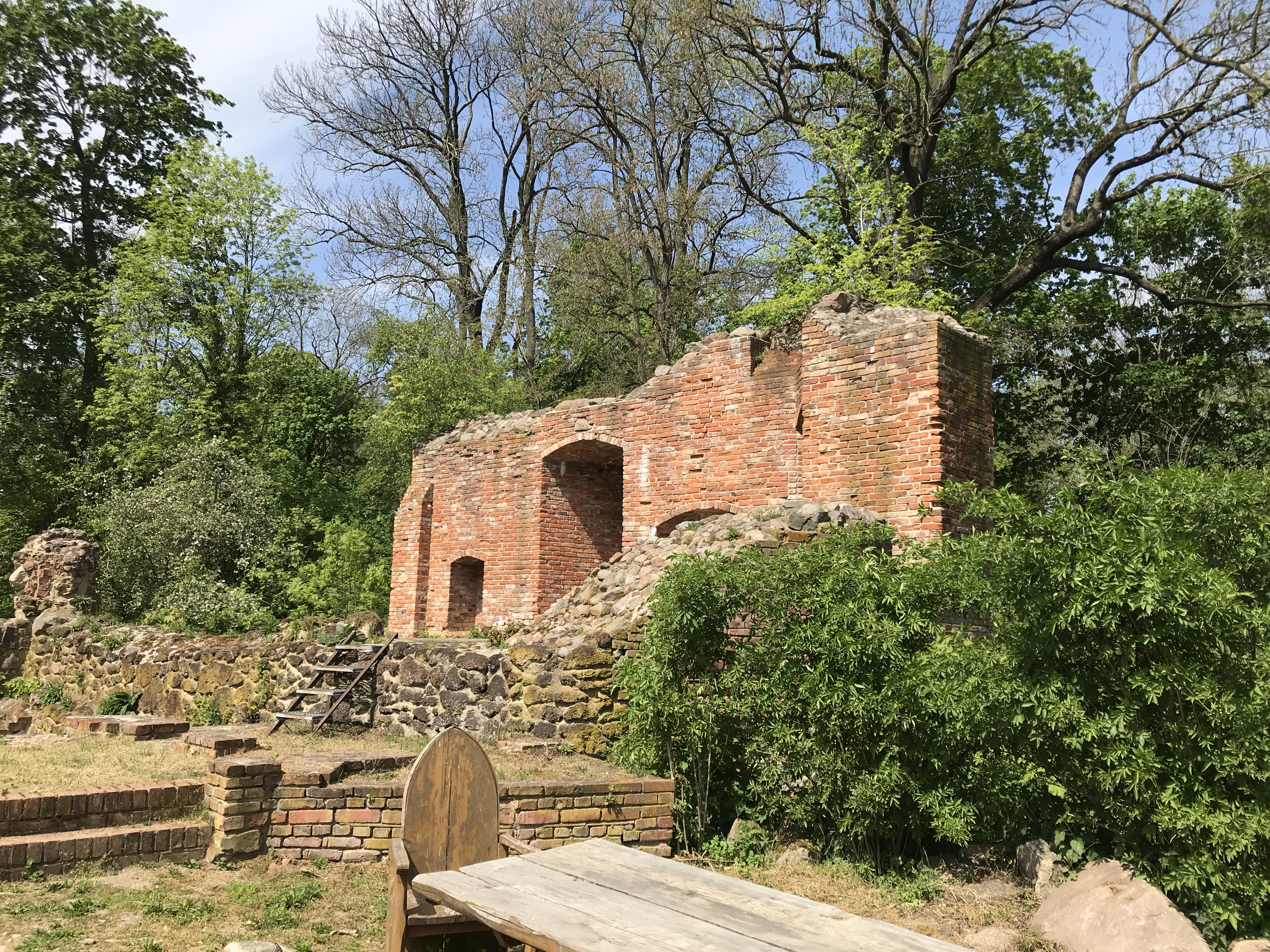 Ruine der mittelalterlichen ehemaligen Wasserburg in Bärwalde, Gemeinde Niederer Fläming